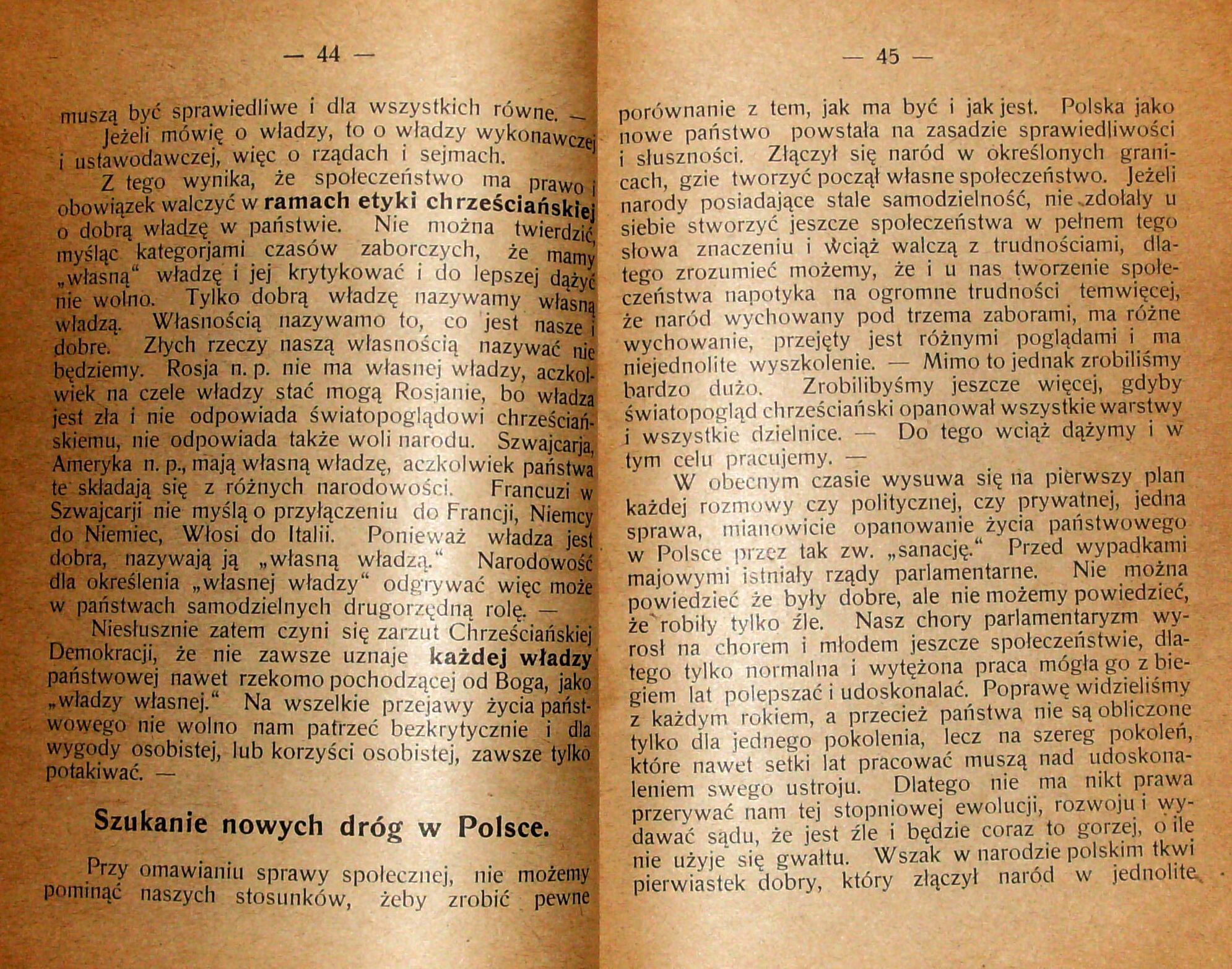 Stanisław Krzyżowski, Rozmyślania w czterdziestą rocznicę encykliki „Rerum novarum”, wydanej 15 maja 1891 r. przez papieża Leona XIII, Pszczyna 1931